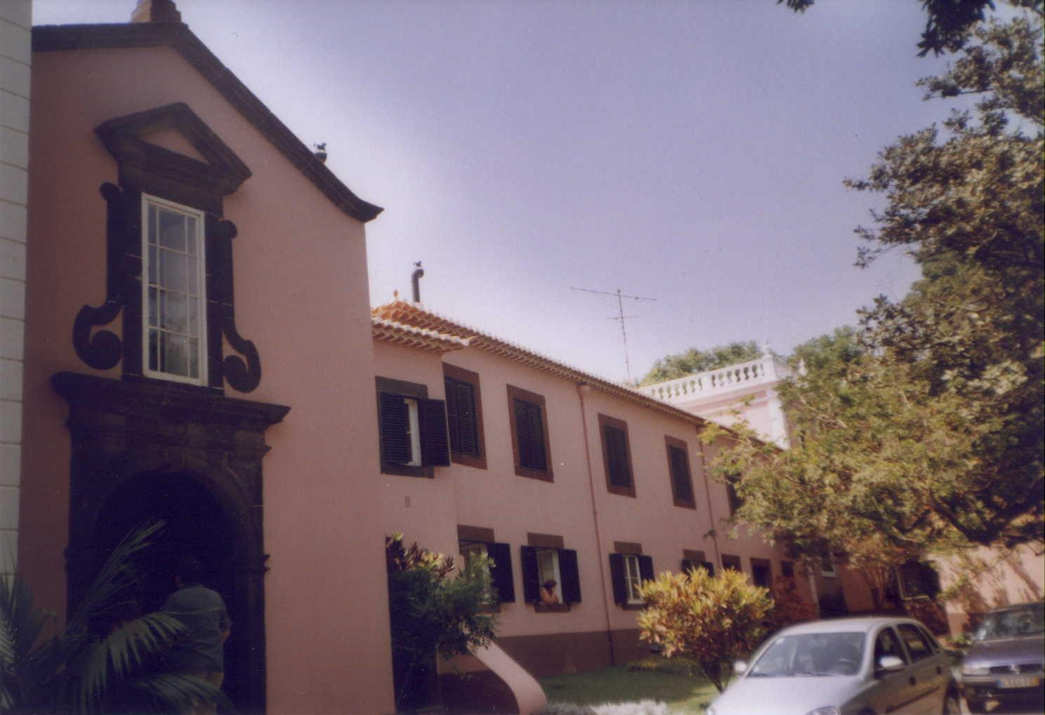 Quinta Vigia, kdysi v ní bydlela Sissi, dnes sídlo hostů madeirské vlády. Dnešní Quinta Vigia – oficiální vládní rezidence.